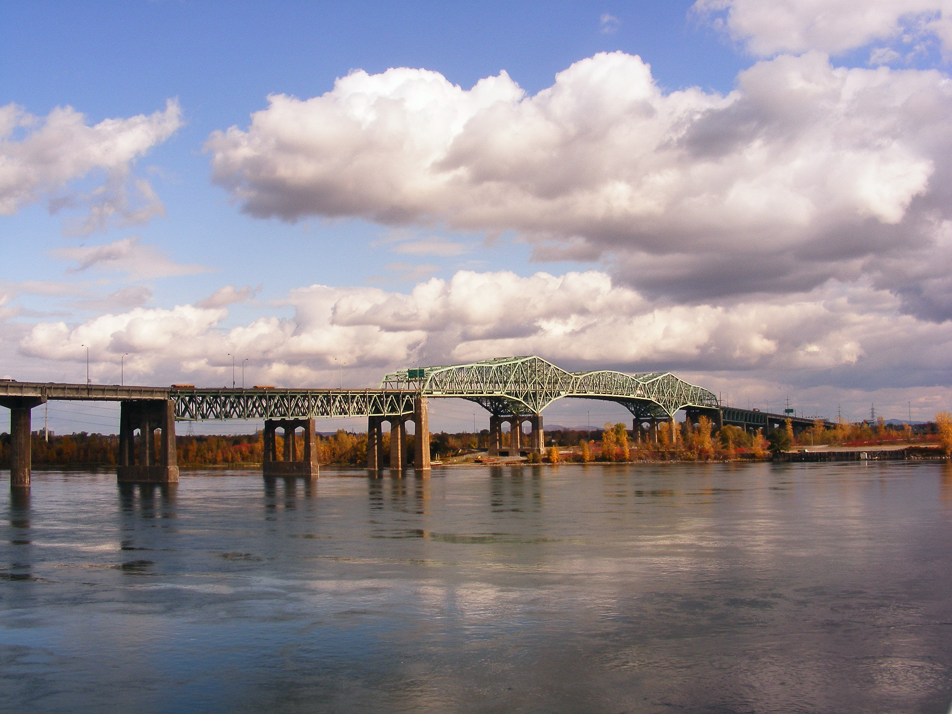 fleuve Saint-Laurent